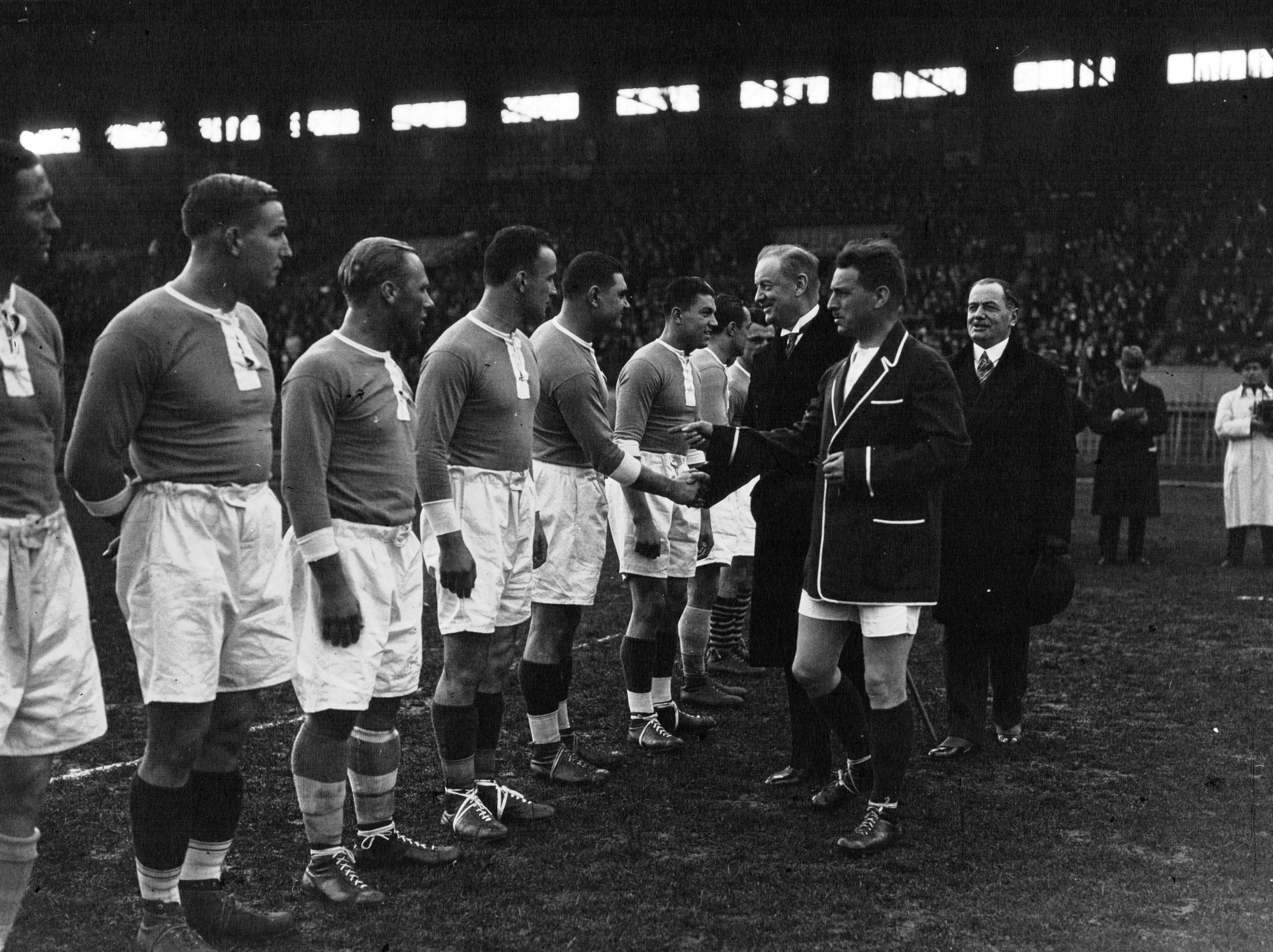 L'équipe de France de Rugby joue contre son reste à Colombes équipe : M. Marcombes félicite les joueurs de l'équipe de France avant la partie [photographie de presse]